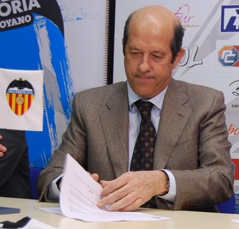 Manuel Llorente, president del València CF, signant un conveni de coŀlaboració amb el CD Alcoyano.